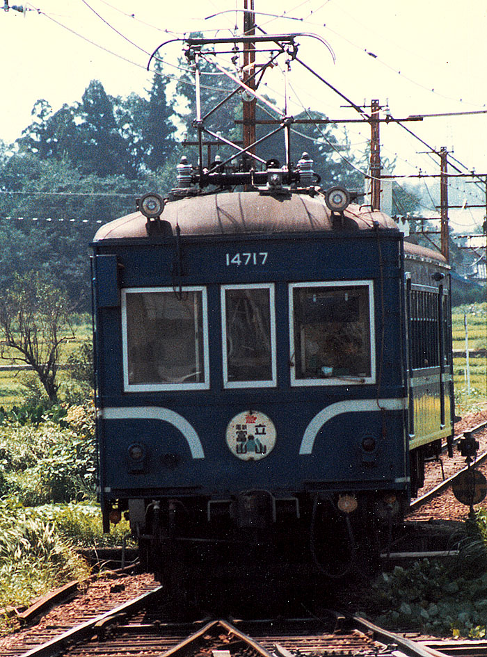 富山地方鉄道 14717